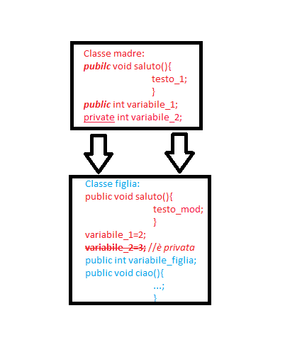 rappresentazione grafica ereditarietà di attributi e metodi. In rosso sono gli attributi e metodi della classe madre, mentre in blu quelli della classe figlia.